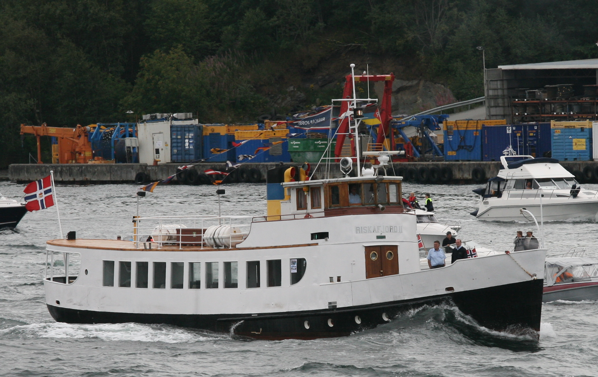 MS Riskafjord